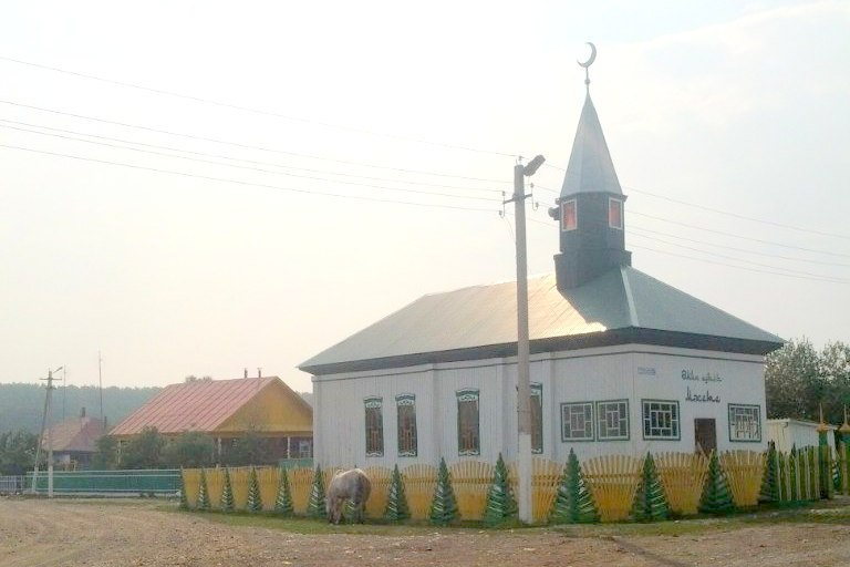 Башҡортса: Әмин ауылы мәсете, 2011 йыл кире тергеҙелде.